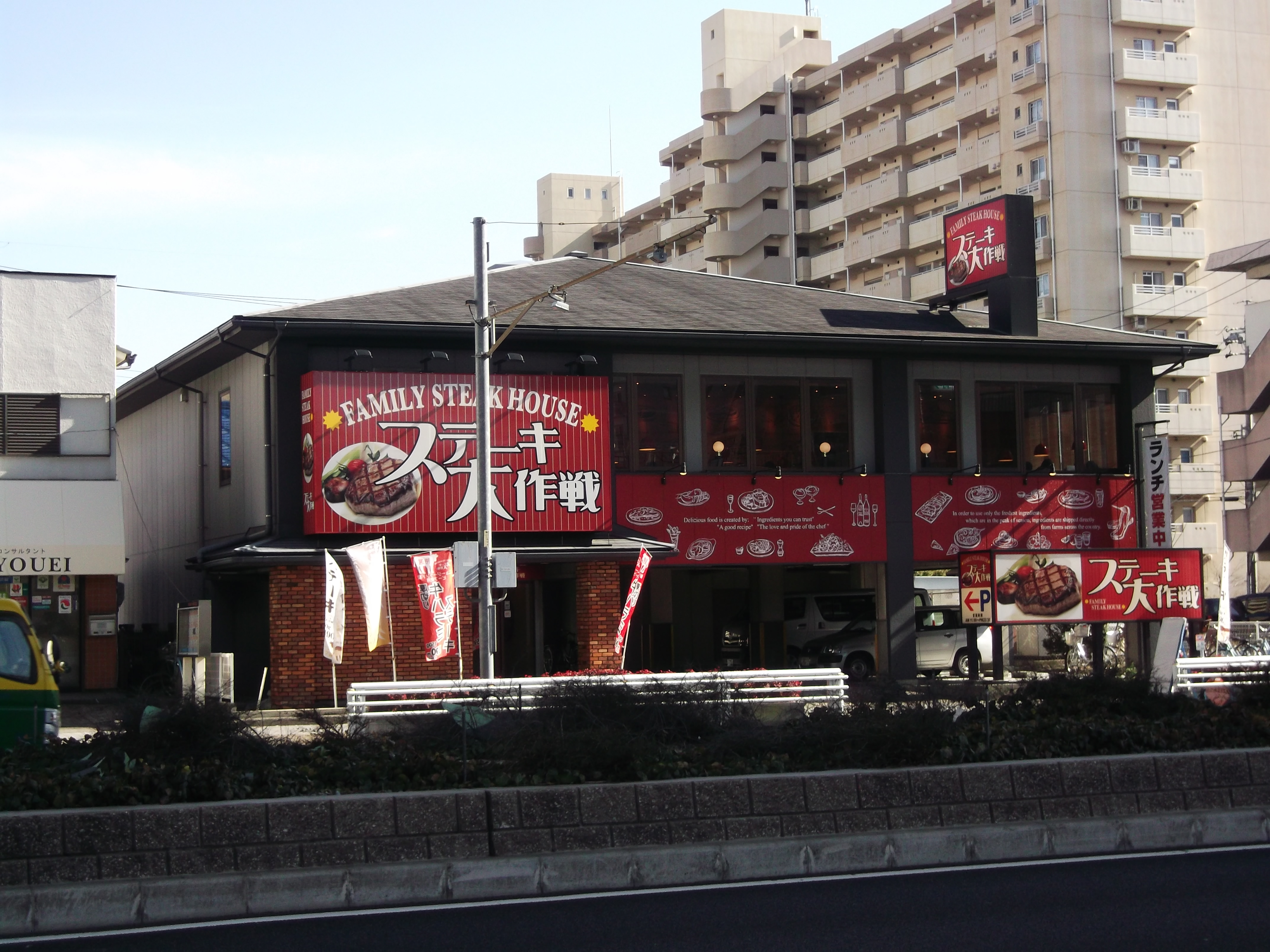 名古屋市北区萩野通にあるステーキ大作戦名古屋萩野通り店を西側から写す